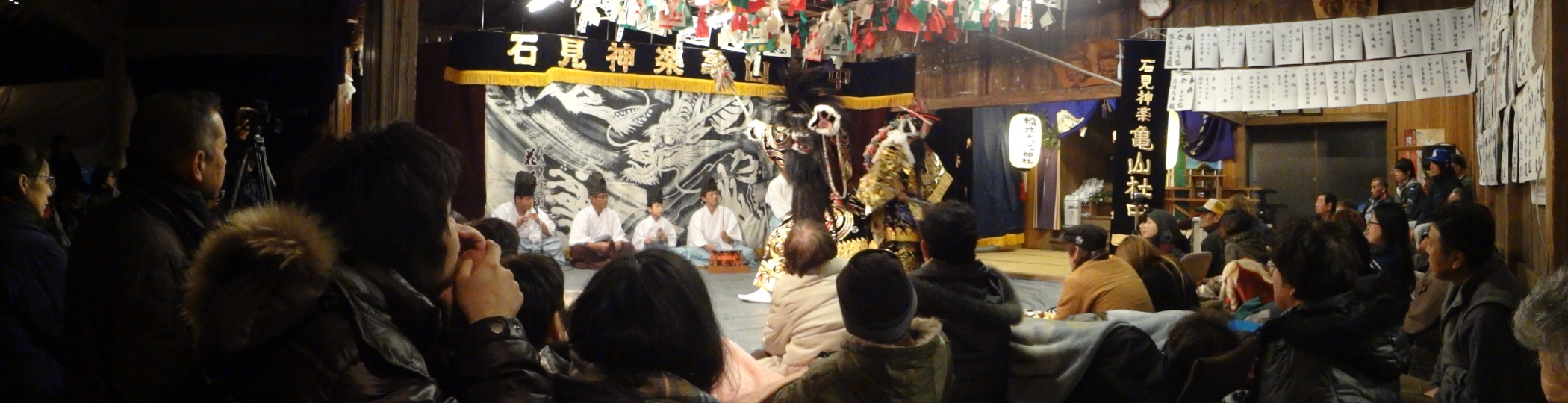 神社での石見神楽奉納の様子。小さな神社の境内には夜店も出ており、賑やかで和やかな雰囲気の中、夜を徹して朝まで演じられる（夜明け舞）。演目は『鍾馗（しょうき）』。石見神楽亀山社中（島根県浜田市）。